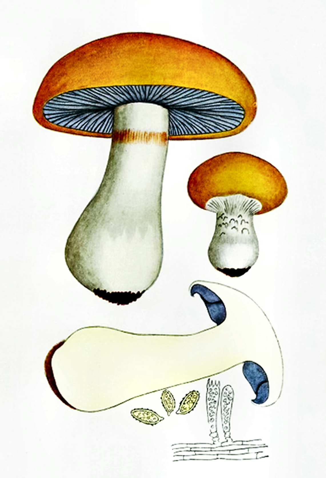 Giacomo Bresadola: Cortinarius varius